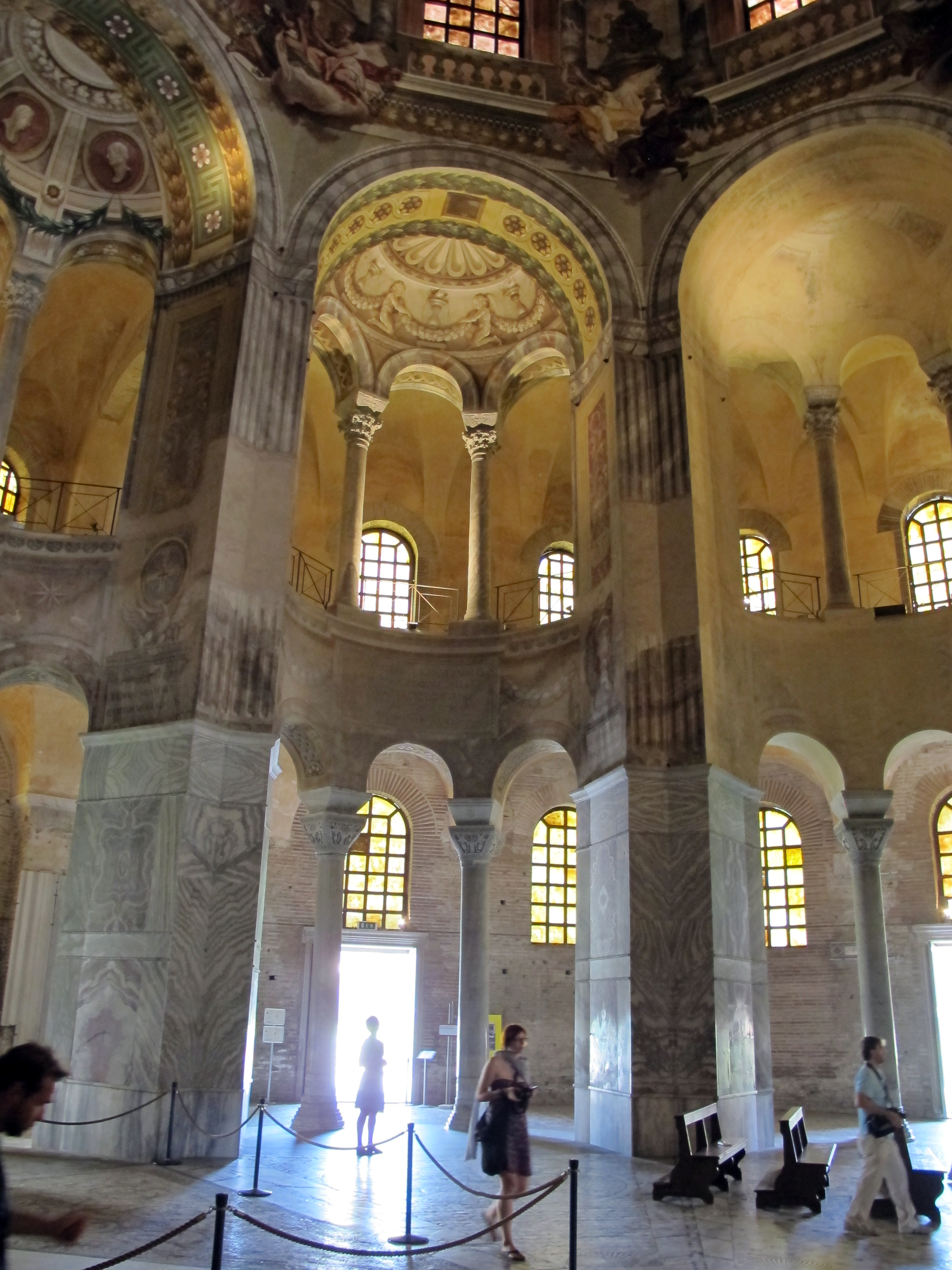 Basilica di San Vitale - MIBAC This is a photo of a monument which is part of cultural heritage of Italy.